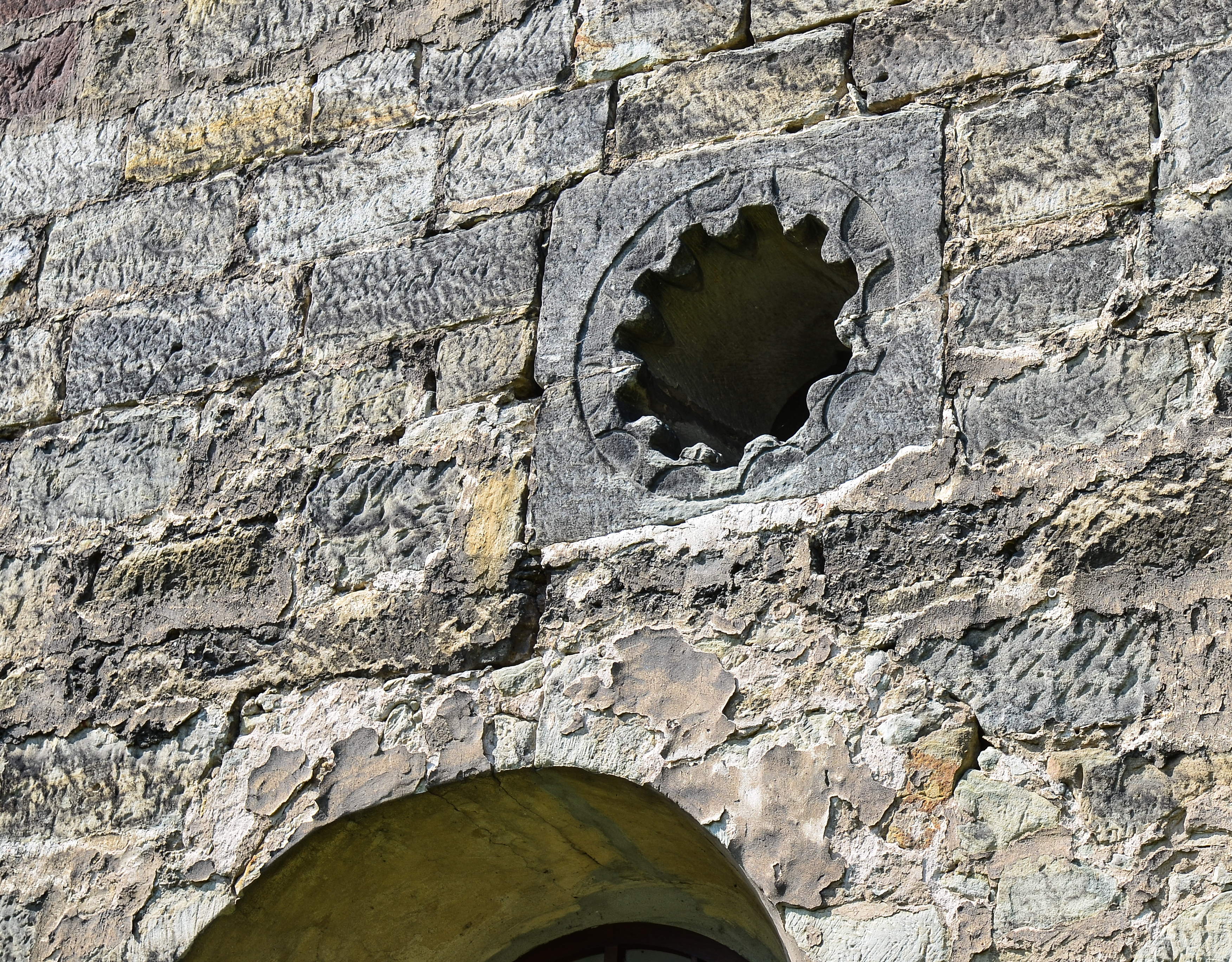 Leutra St.Nikolauskirche Elfpassfenster "Rose von Leutra"